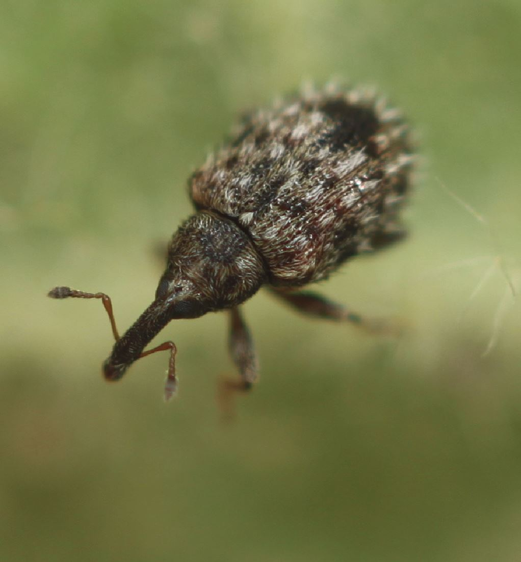 Rüsselkäfer Cleopus solani am 22. Februar 2020 an Königskerze nahe Rheinufer südlich Mannheim